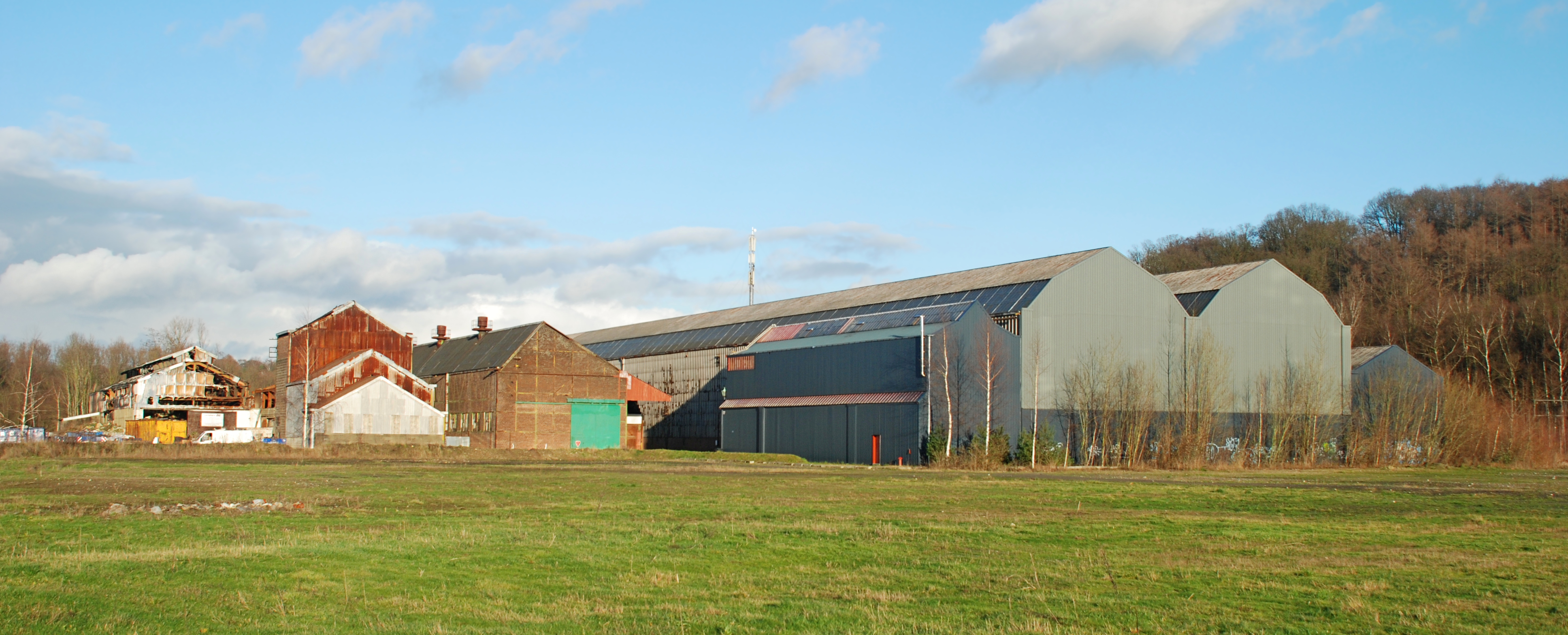 Belgique - Court-Saint-Étienne - Usines Émile Henricot - Vestiges : hangars